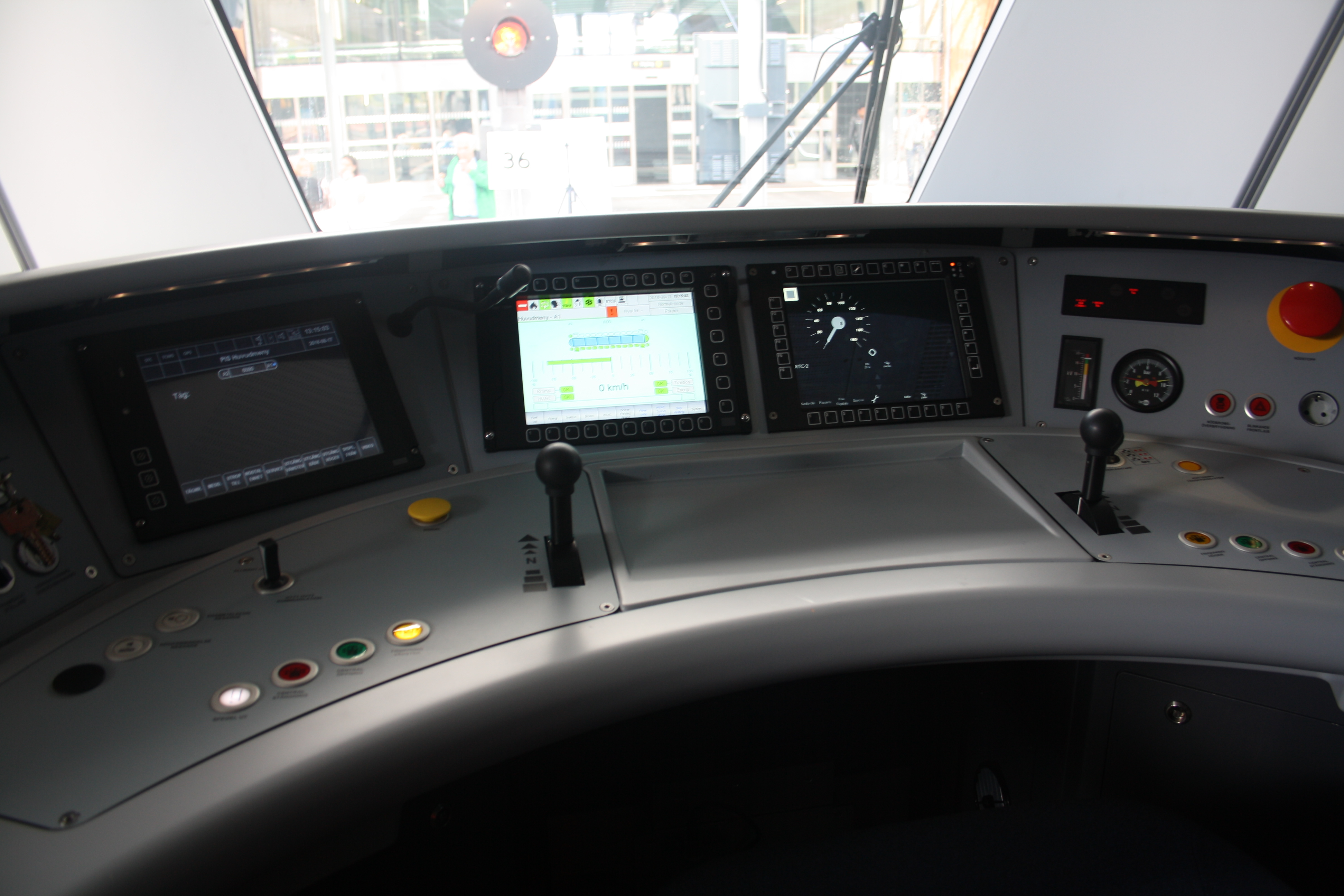 Hytten på X60B